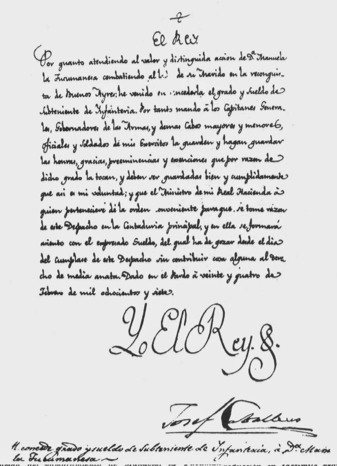 Documento real en el que el rey Carlos IV de España otorga el grado de subteniente de infantería a Manuela Pedraza. Se conserva en el Instituto Histórico de la Ciudad de Buenos Aires.